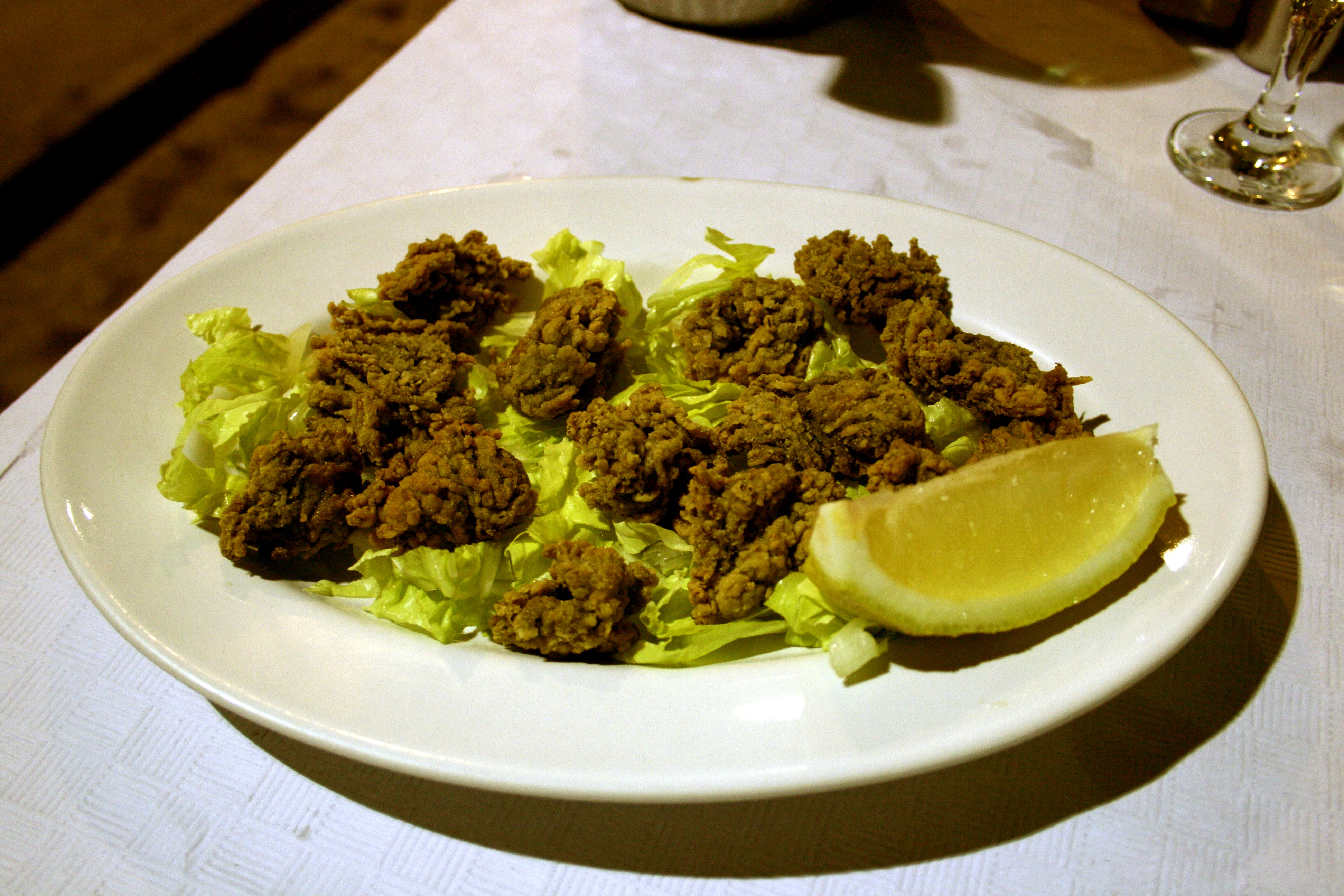 Hortiguillas